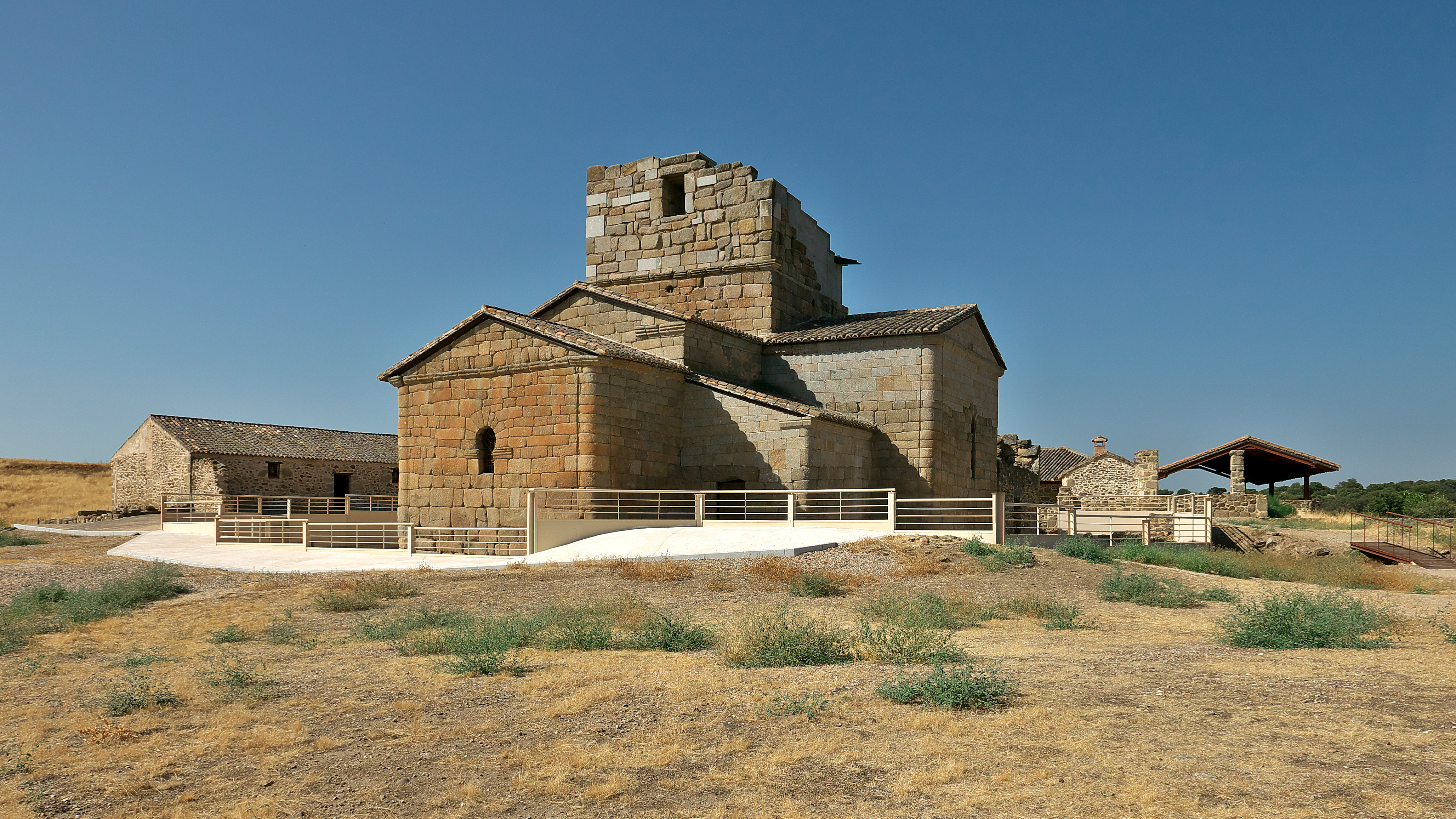 Bajo a órbita de la Civitas Regia Toledana, la actual panorámica este del monasterio, residencia palatina, explotación agrícola e iglesia. Distintivo cultural e histórico de la Alta Edad Media española.